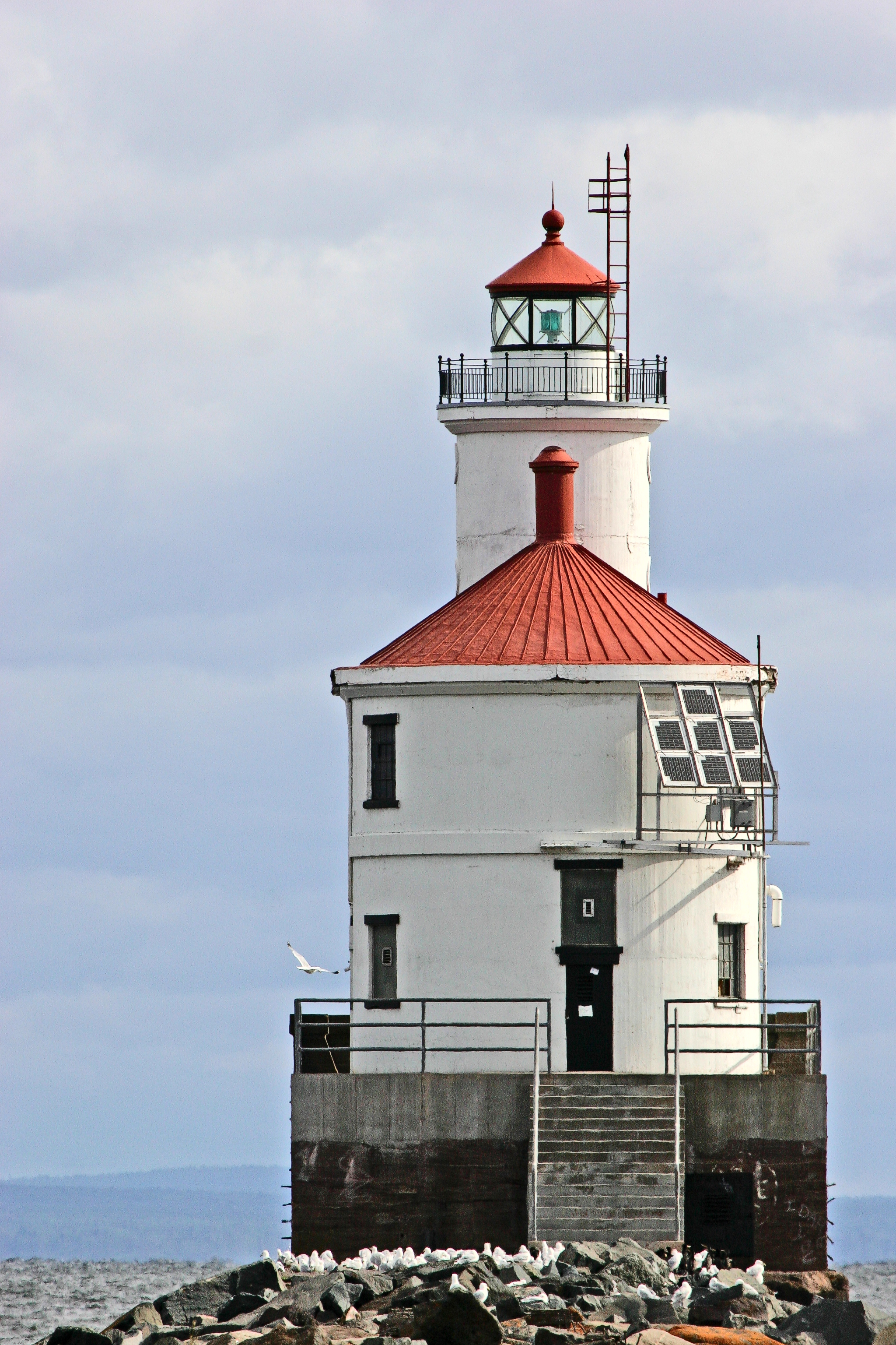 Better viewed Large